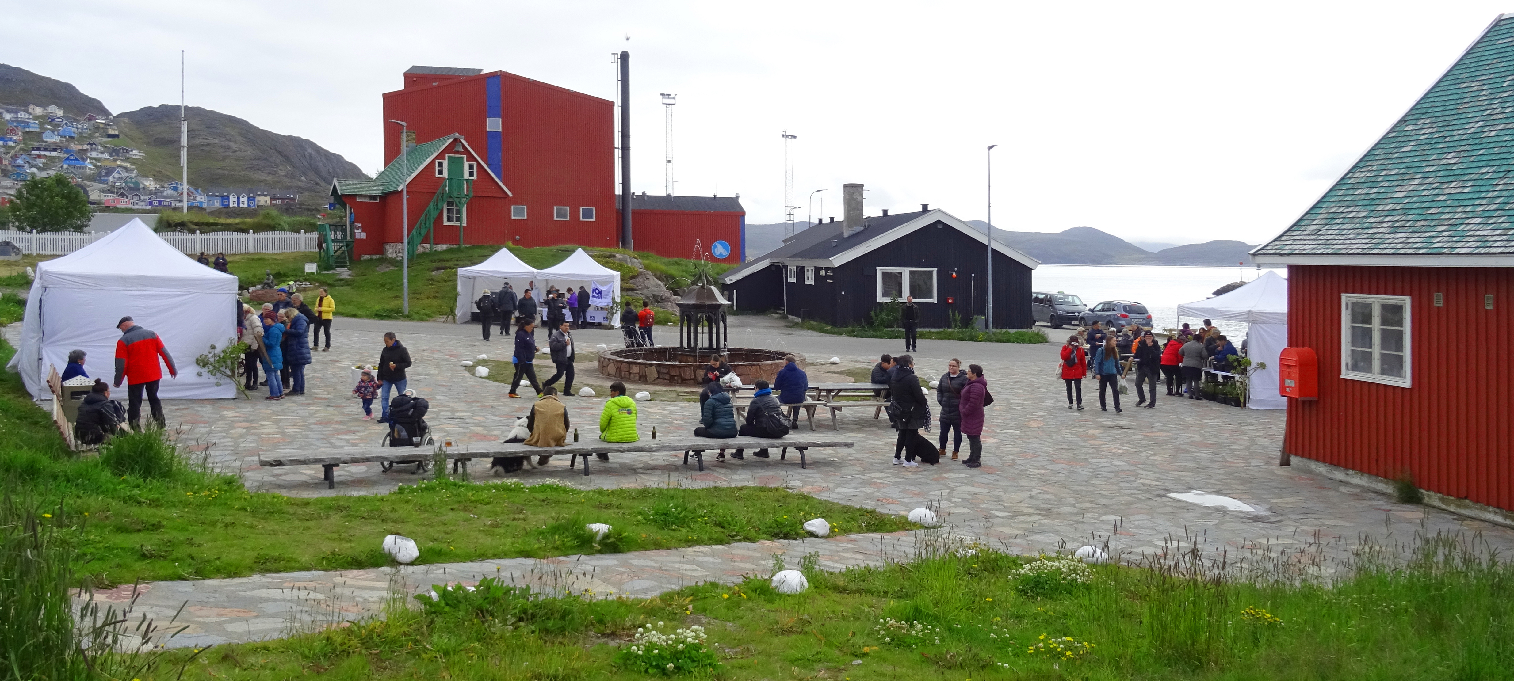 Qaqortoq, Marktplatz mit Springbrunnen von Pavia Høegh (1927) zu Beginn des Igasa Food Festivals. Im Hintergrund das Tele-Museum.